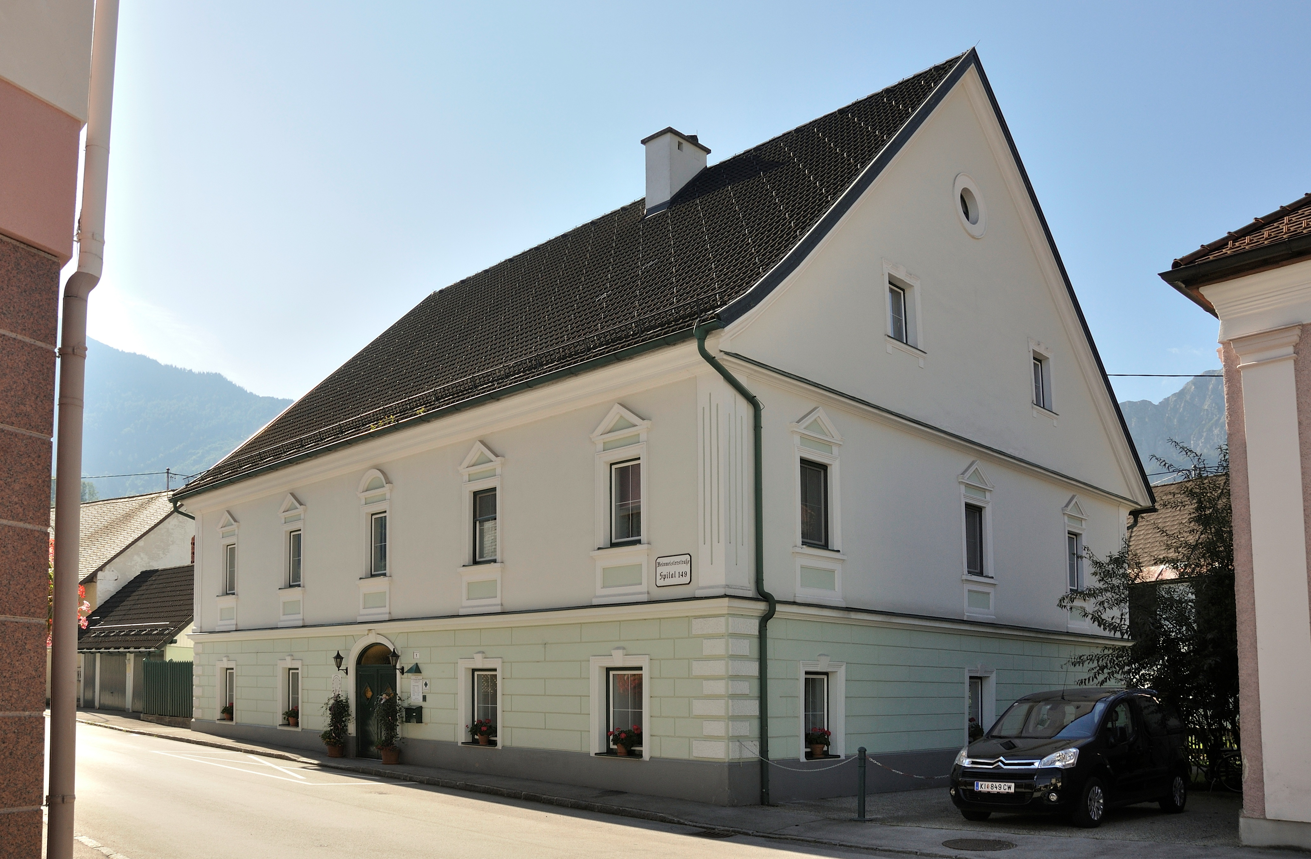 Hofschmiedewerkstätte, altes Hofschmiedhaus, ehem. Herrenhaus